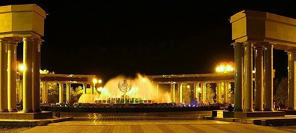 Площадь Независимости в Караганде